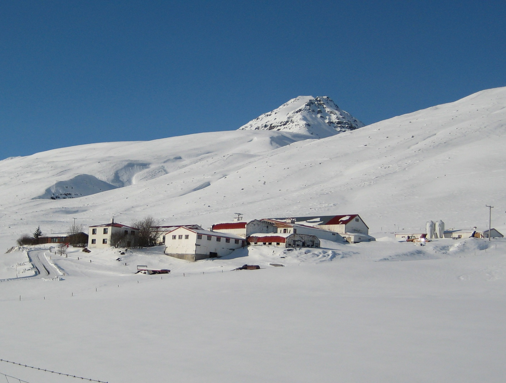 Klaufabrekkur í Svarfaðardal